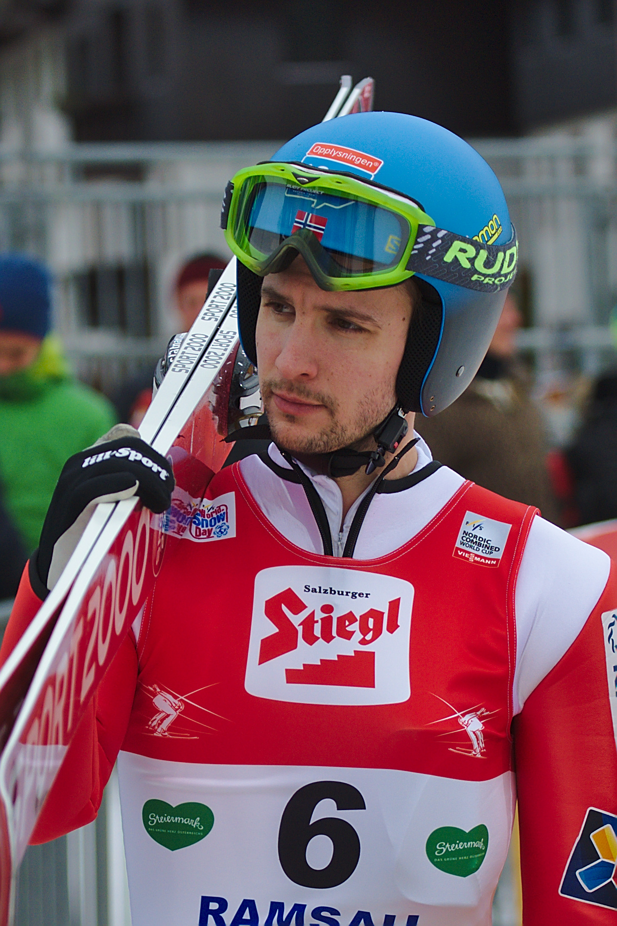 FIS Worldcup Nordic Combined Ramsau 2016. Bild zeigt Jan Schmid (NOR)